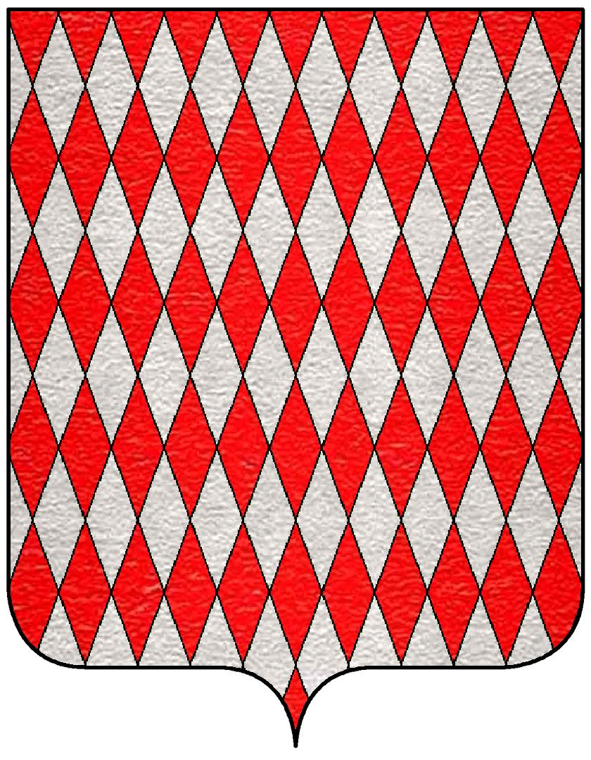 Stemma della famiglia Appiani